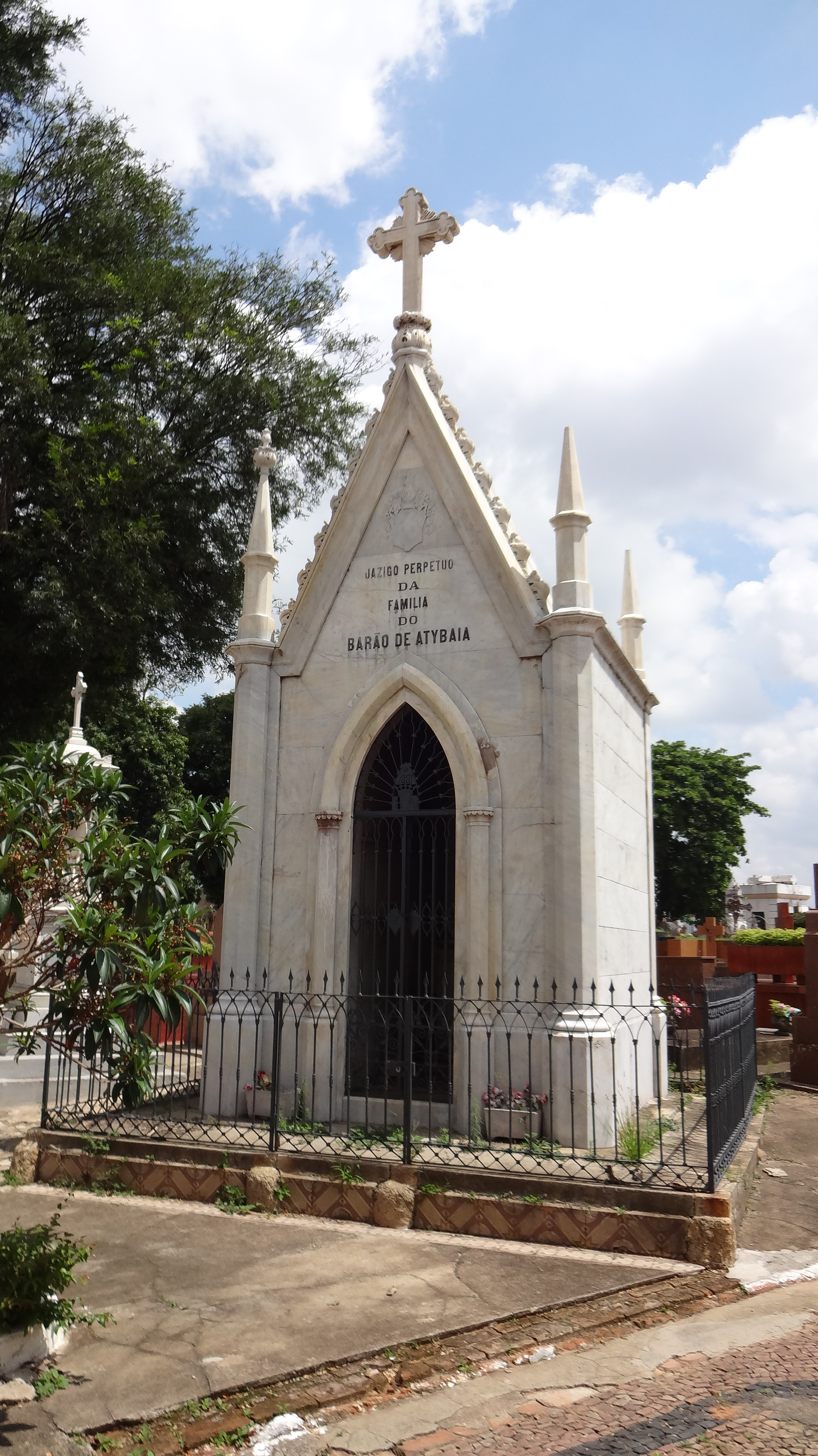 Jazigo Perpetuo da Família do Barão de Atybaia